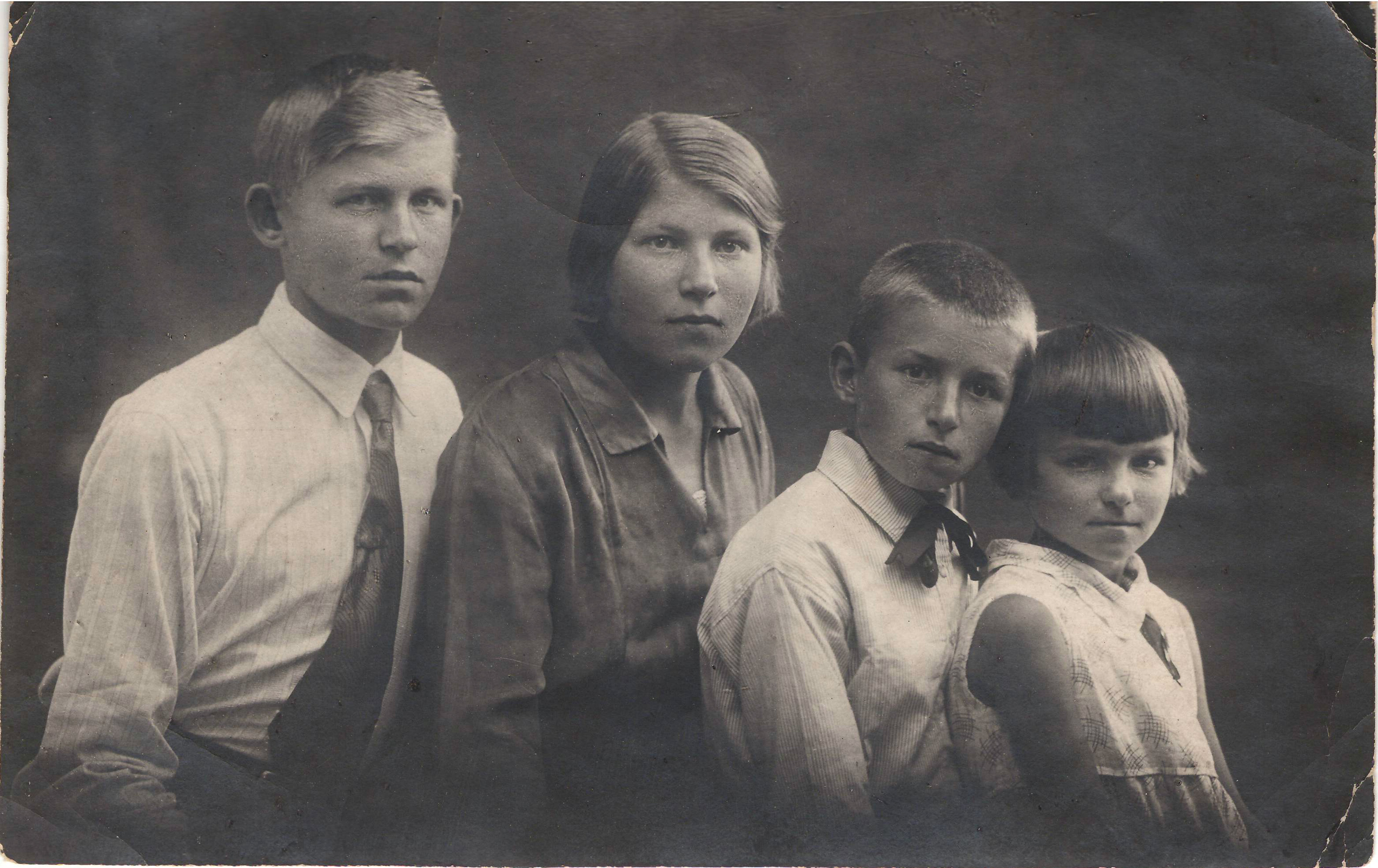 Дети отца Петра: Константин, Серафима, Геннадий, Зоя (слева-направо), 18 июля 1935 год город Бежецк